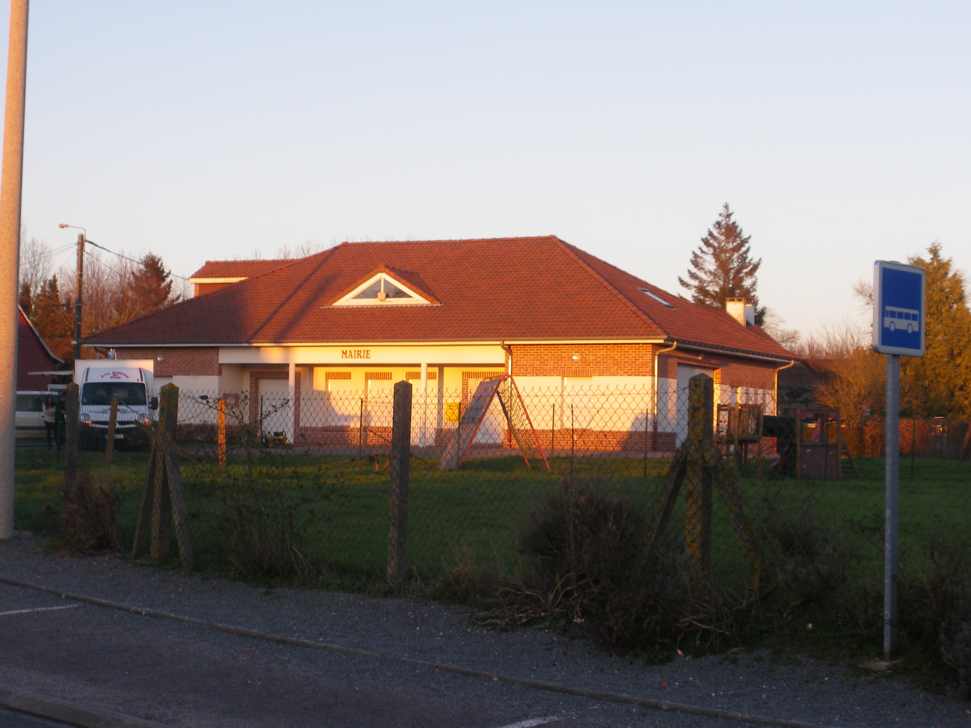 Vue de la mairie de Capelle-lès-Hesdin.